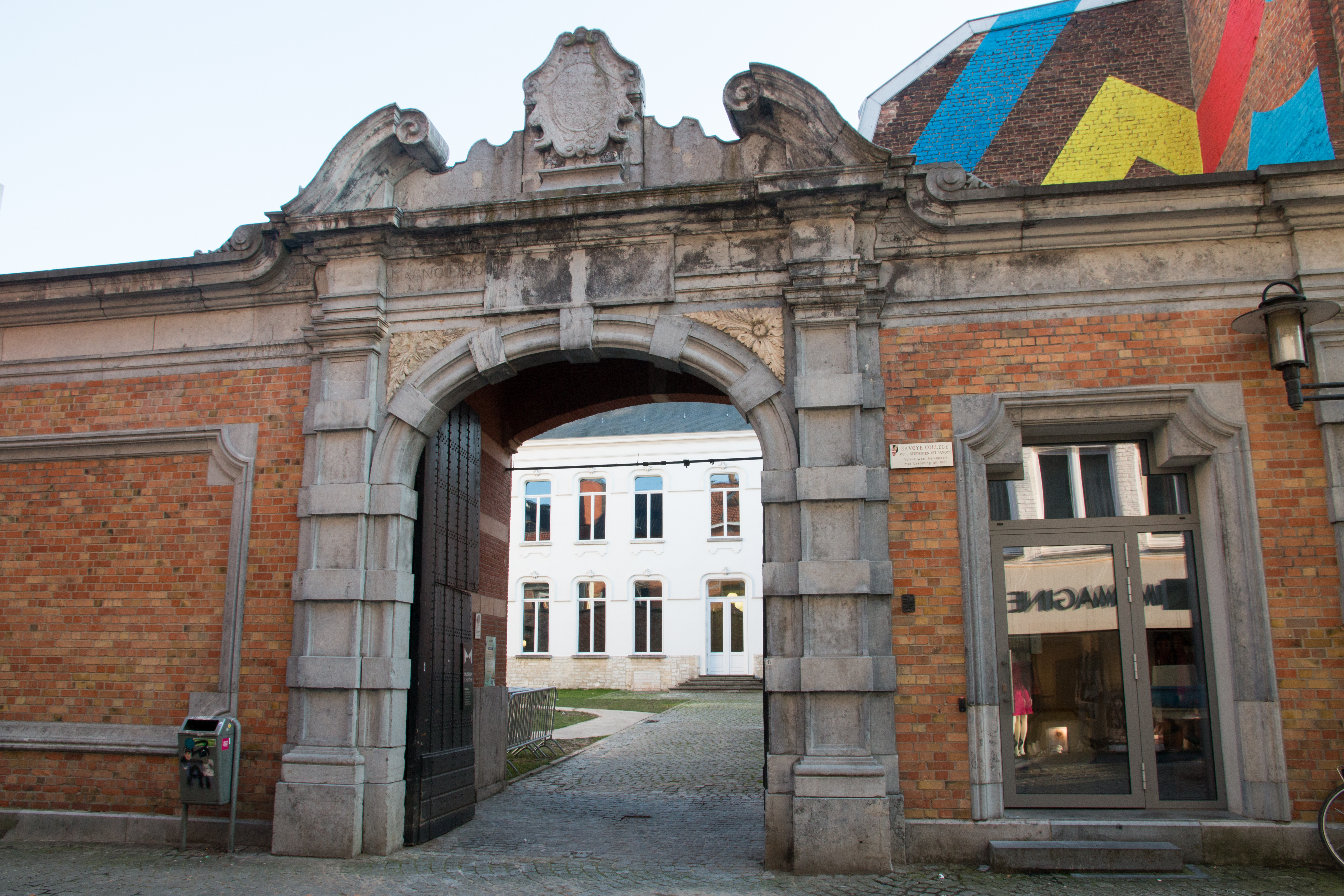 Leuven College van Savoye en huis Vander Kelen-Mertens